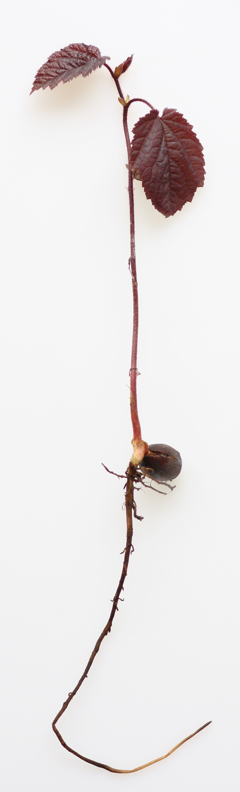 keimende Nuss, Nussbaum